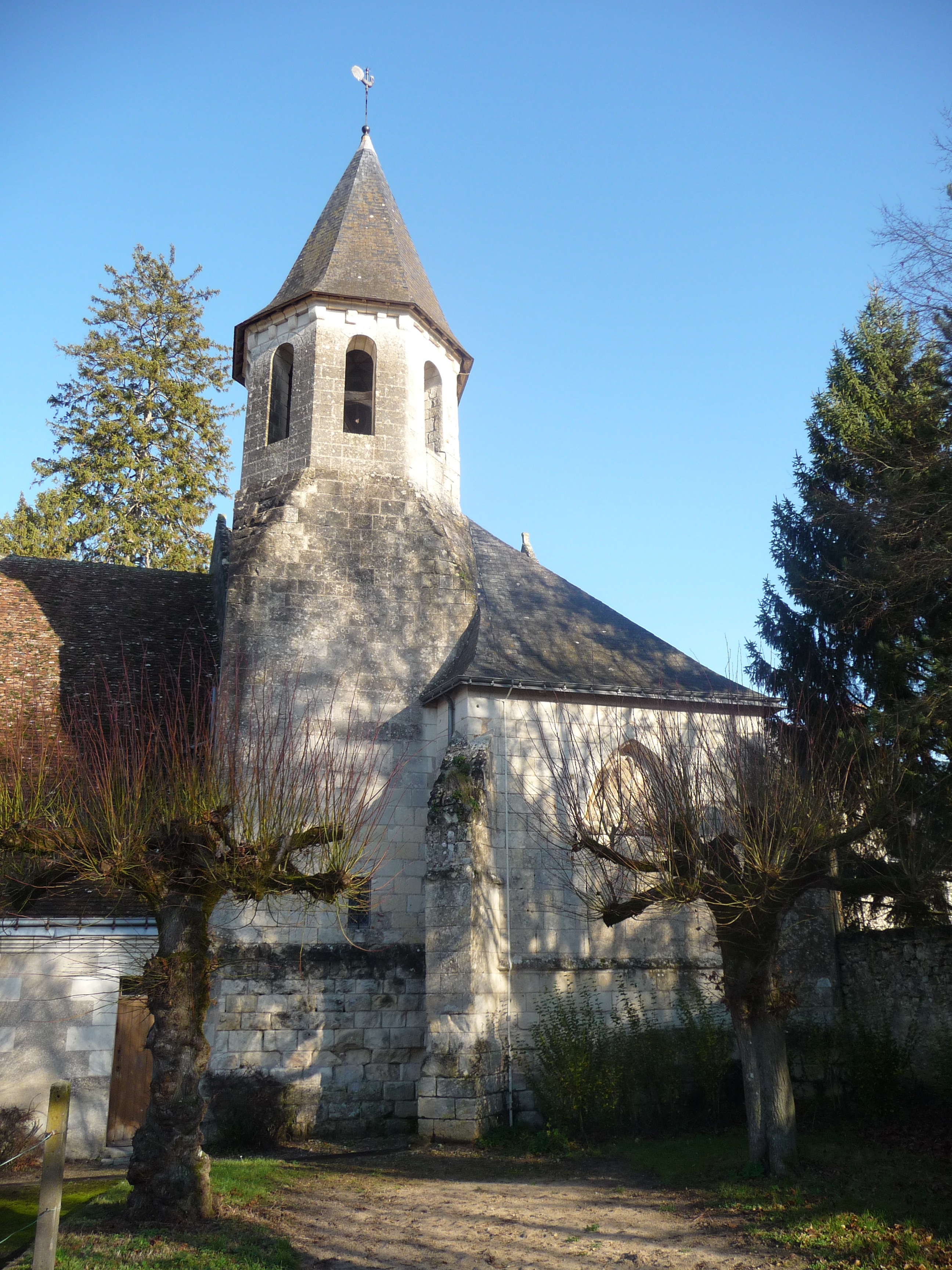 Eglise romane, Saint Jean (Indre et Loire)